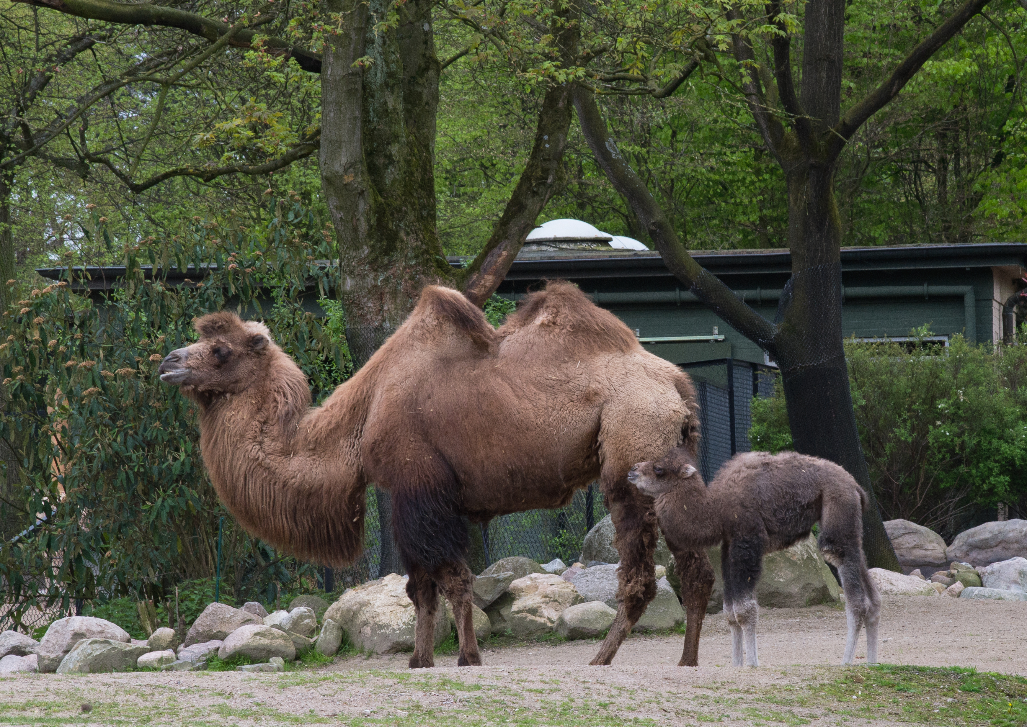 Chameau de Bactriane et son petit